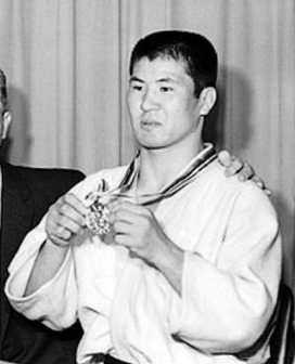 Takehide Nakatani, 1964 Olympics